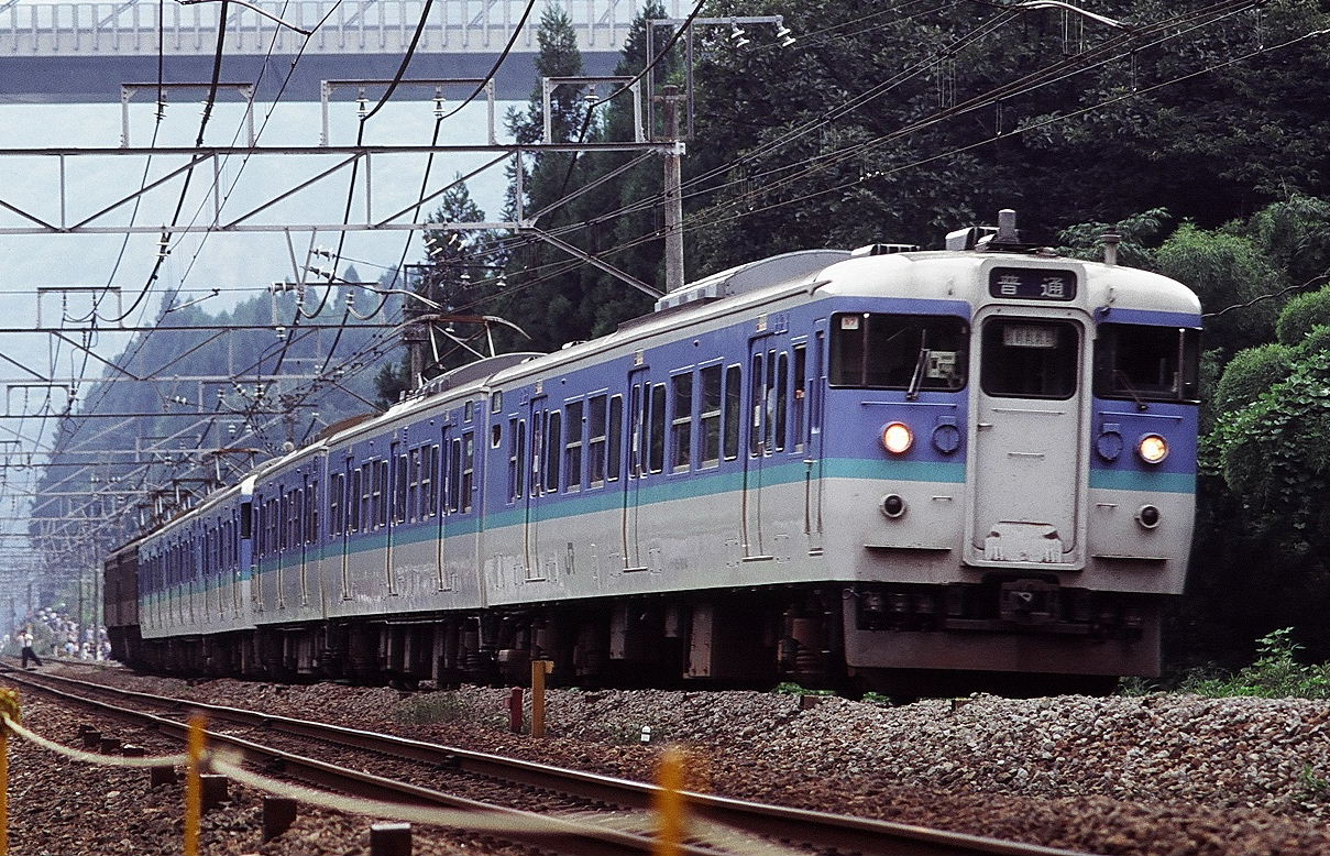 EF63電気機関車の後押しで碓氷峠を登る長野色の115系